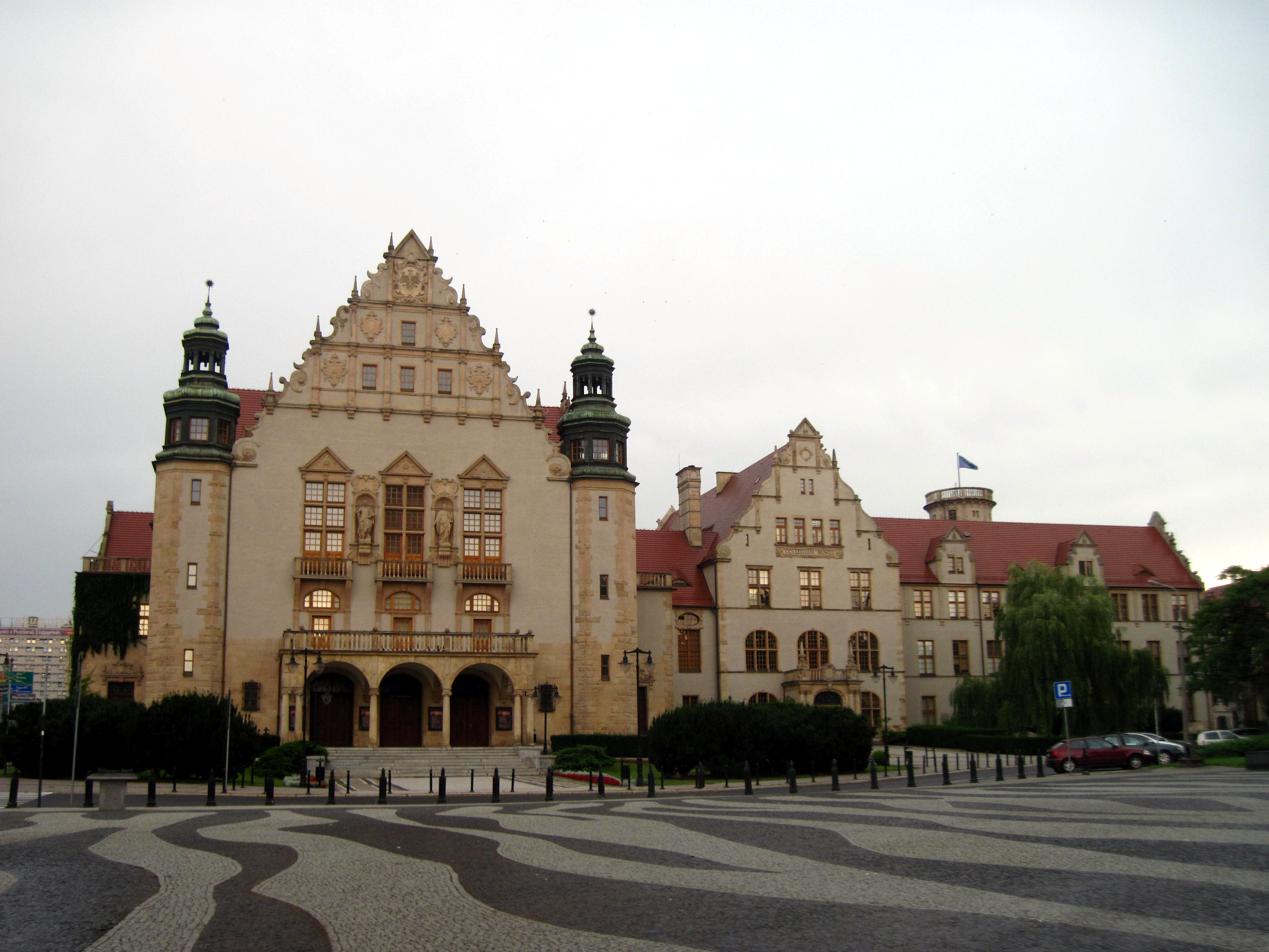 Poznań, collegium Minus - UAM, 1910